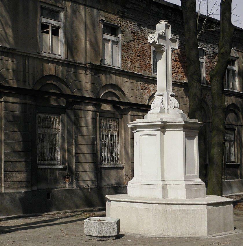 Odrestaurowany krzyż przed wejściem do kościoła farnego.